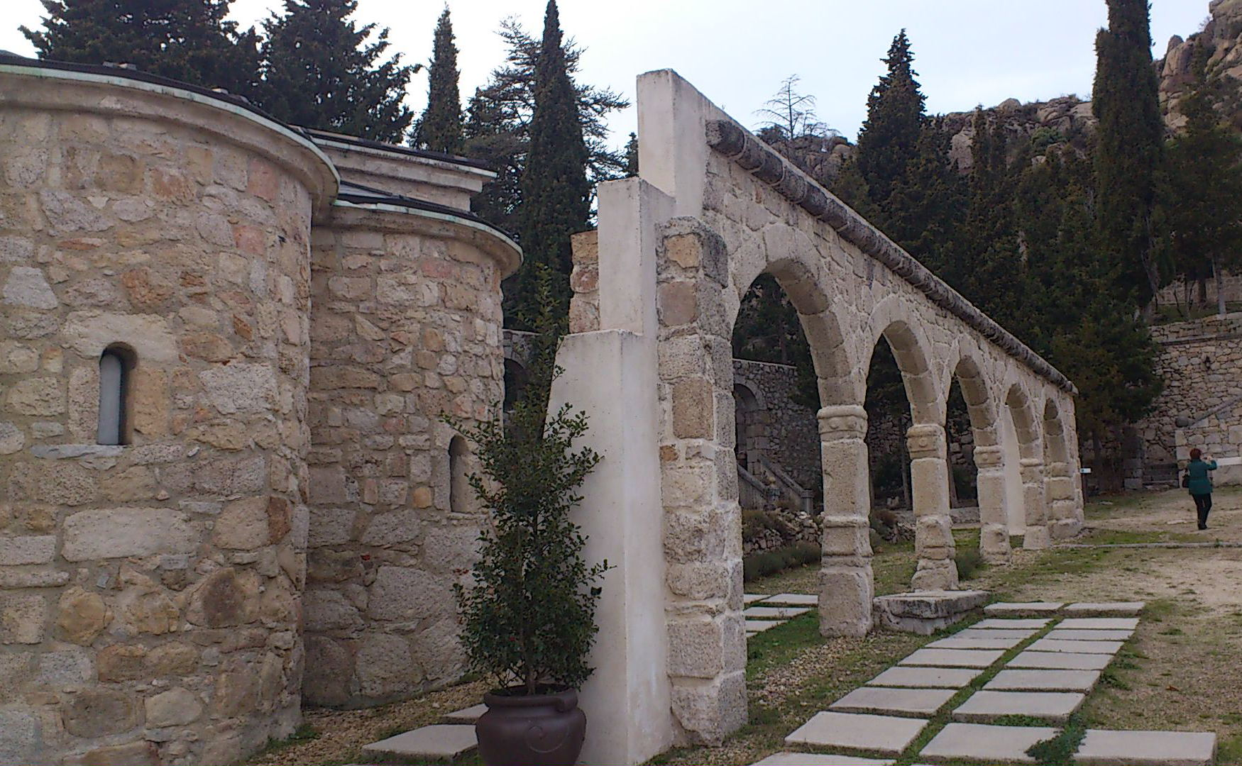 Monasterio de San Julián y San Antonio, en La Cabrera (Madrid)